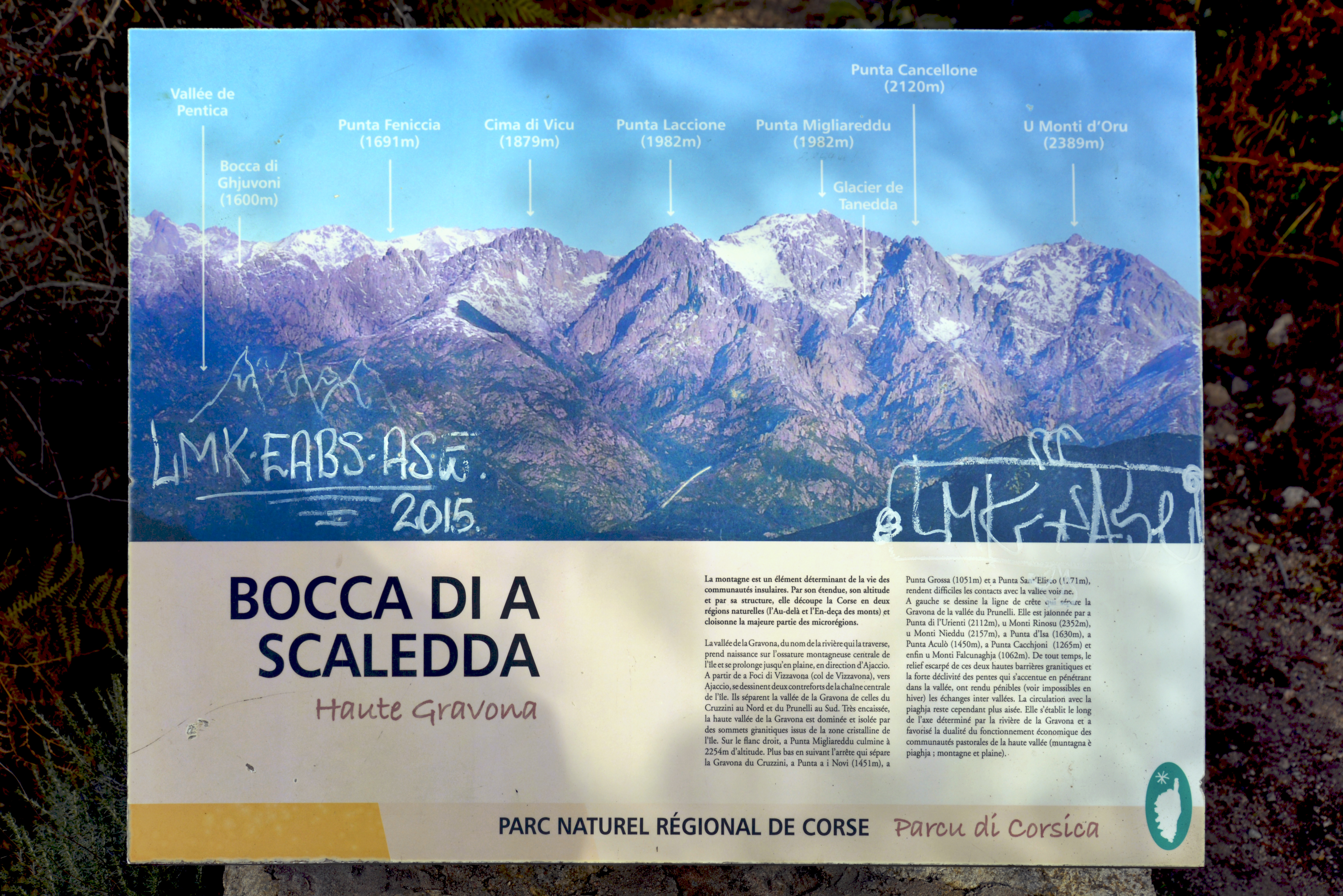 Tavera, Gravona (Corse) - Panneau d'information du parc naturel régional de Corse aux abords de la route D27 au col de Scalella (1193 m).